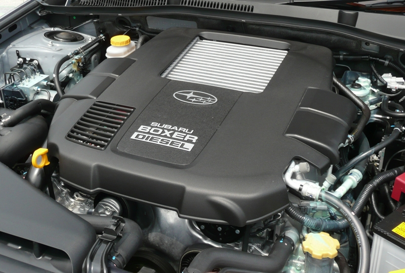 Subaru Boxer EE series diesel engine.